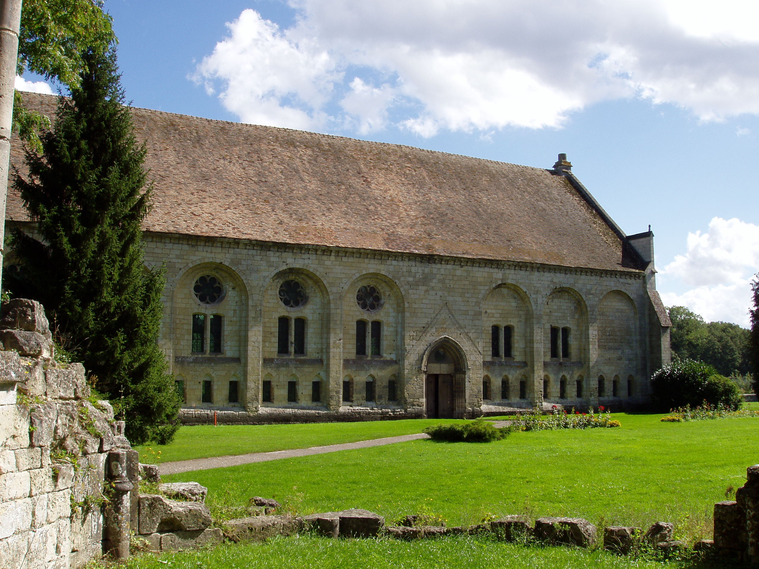 Abbaye d'Ourscamp (Oise) : l'infirmerie des moines